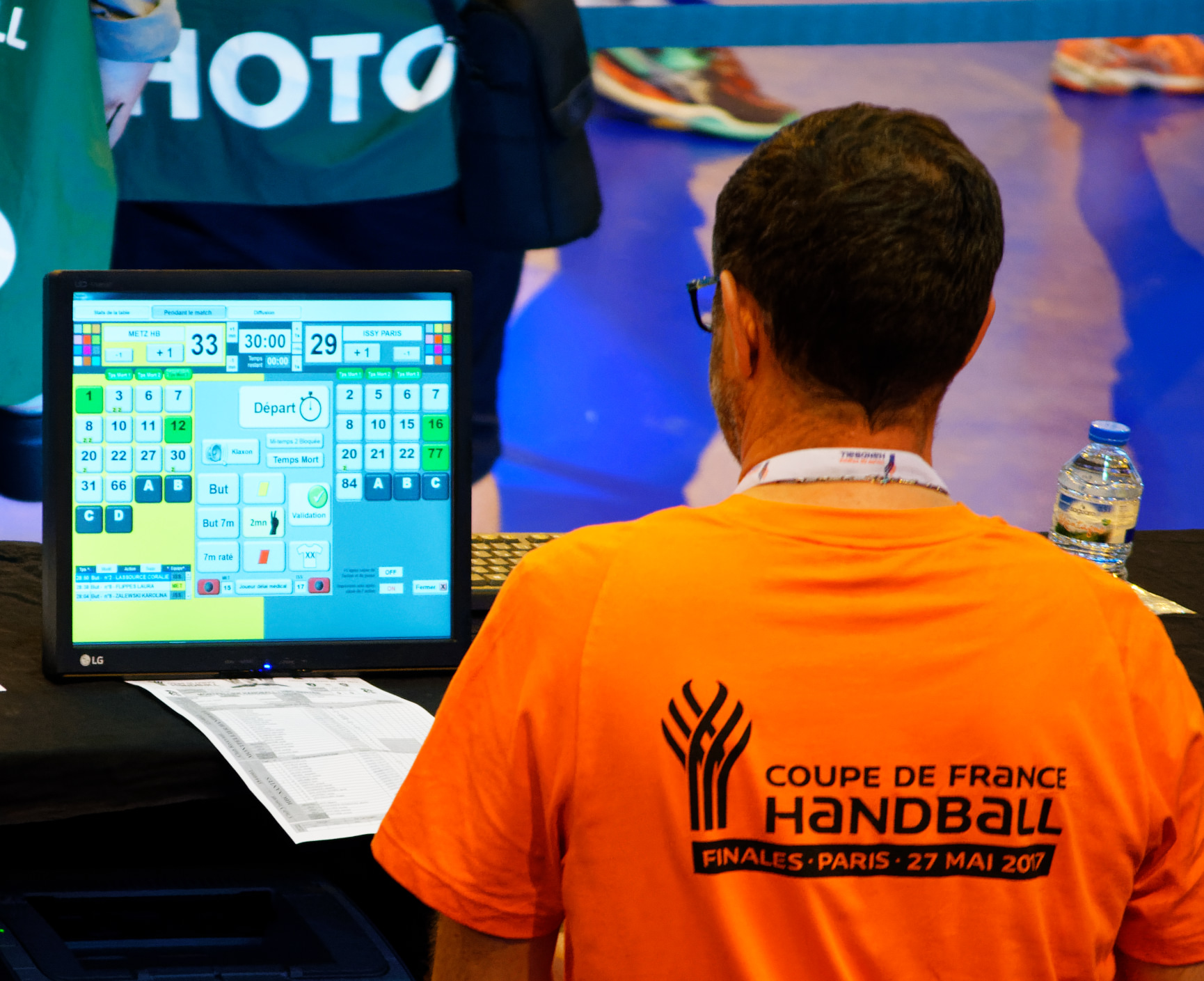 Finale de la Coupe de France de handball 2016-17 entre Metz Handball et Issy Paris Hand. A Bercy, le 27 mai 2017.